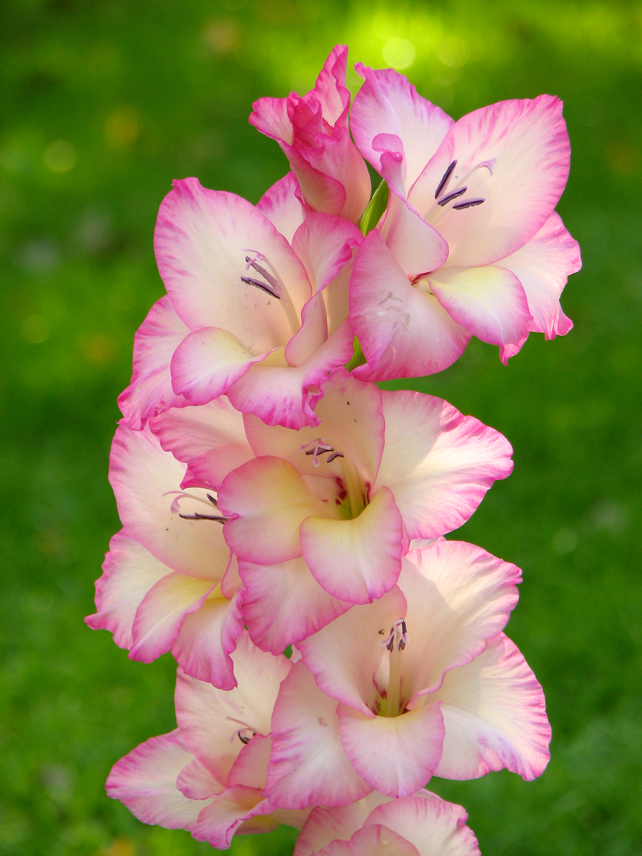 Hybrid Gladiolus cultivar "Priscilla".